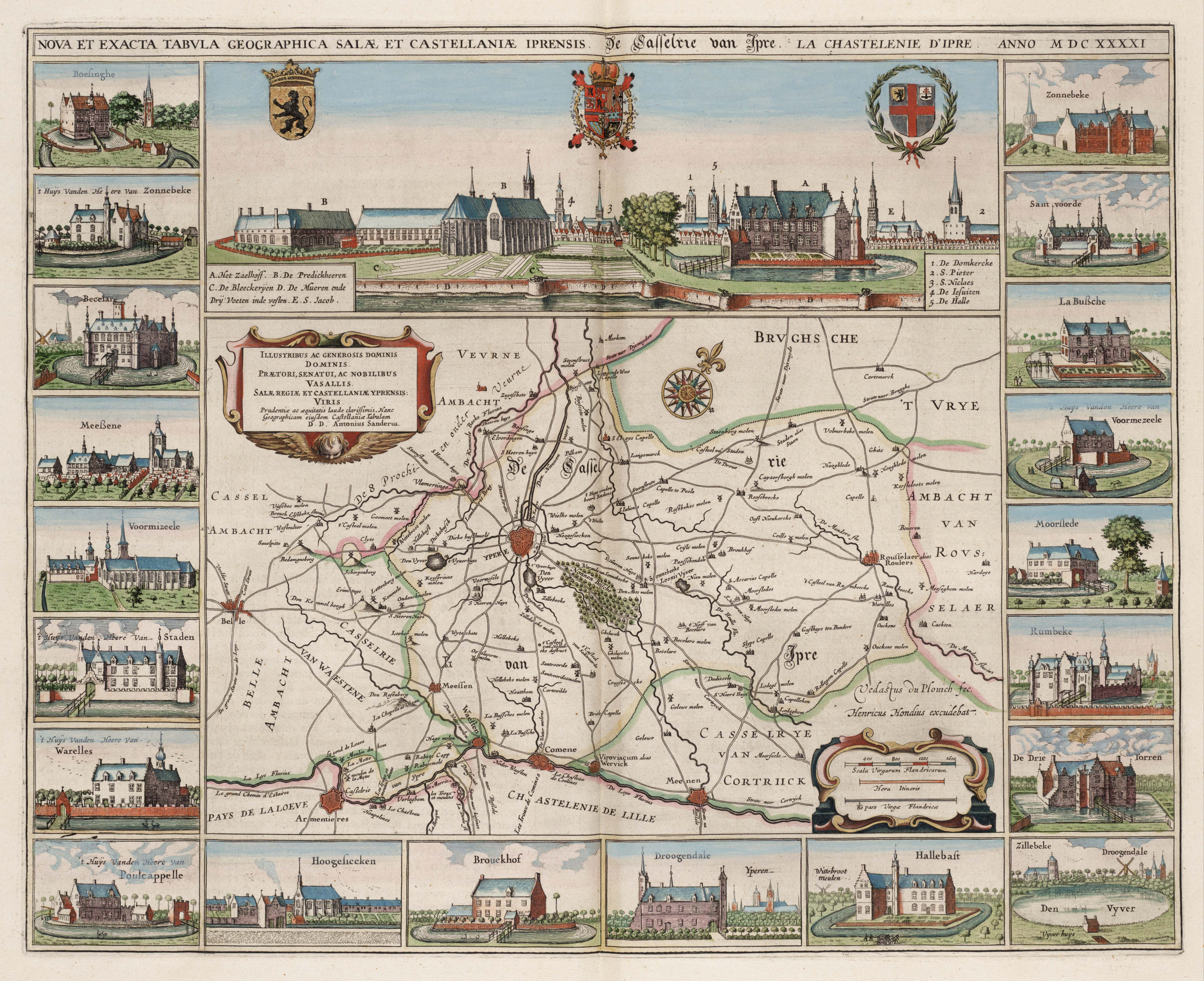 Kaart van de kastelen in de omgeving van Ieper, België